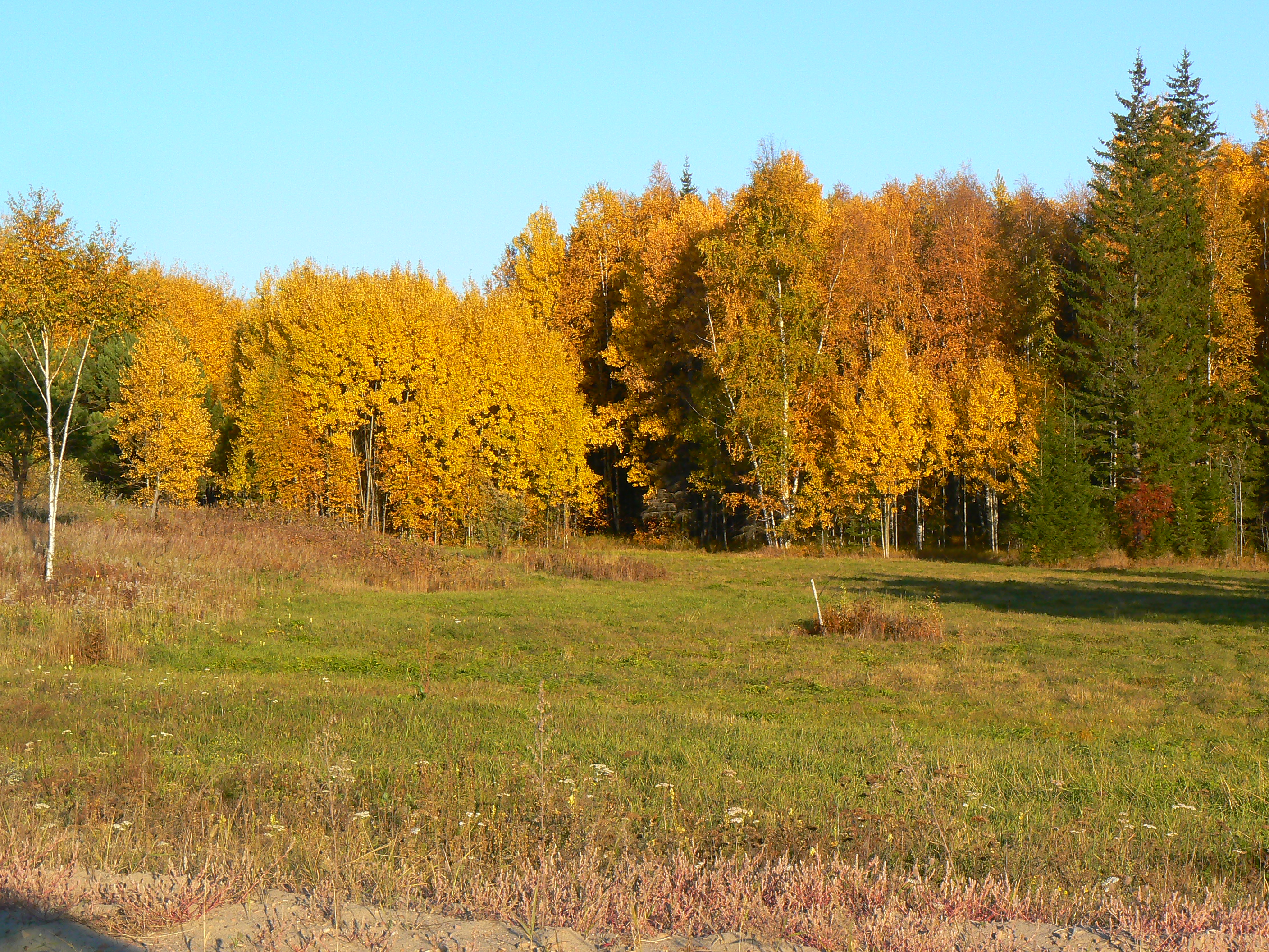 Золотое убранство леса